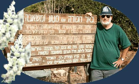 אלישע פורת, תמונה שנמסרה לי על ידי המצולם.